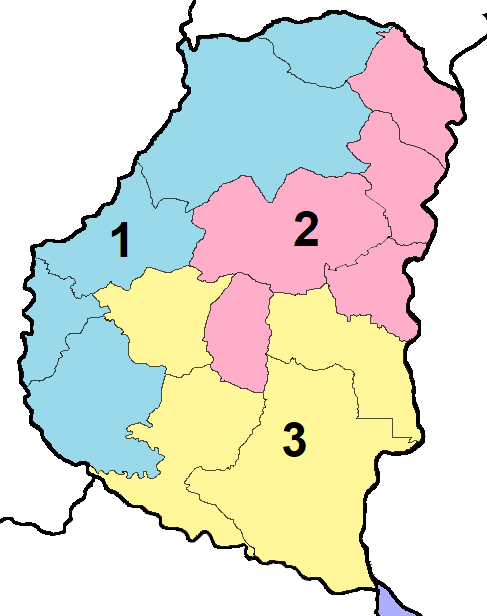 Circunscripciones electorales de Entre Ríos. 1963, 1973.